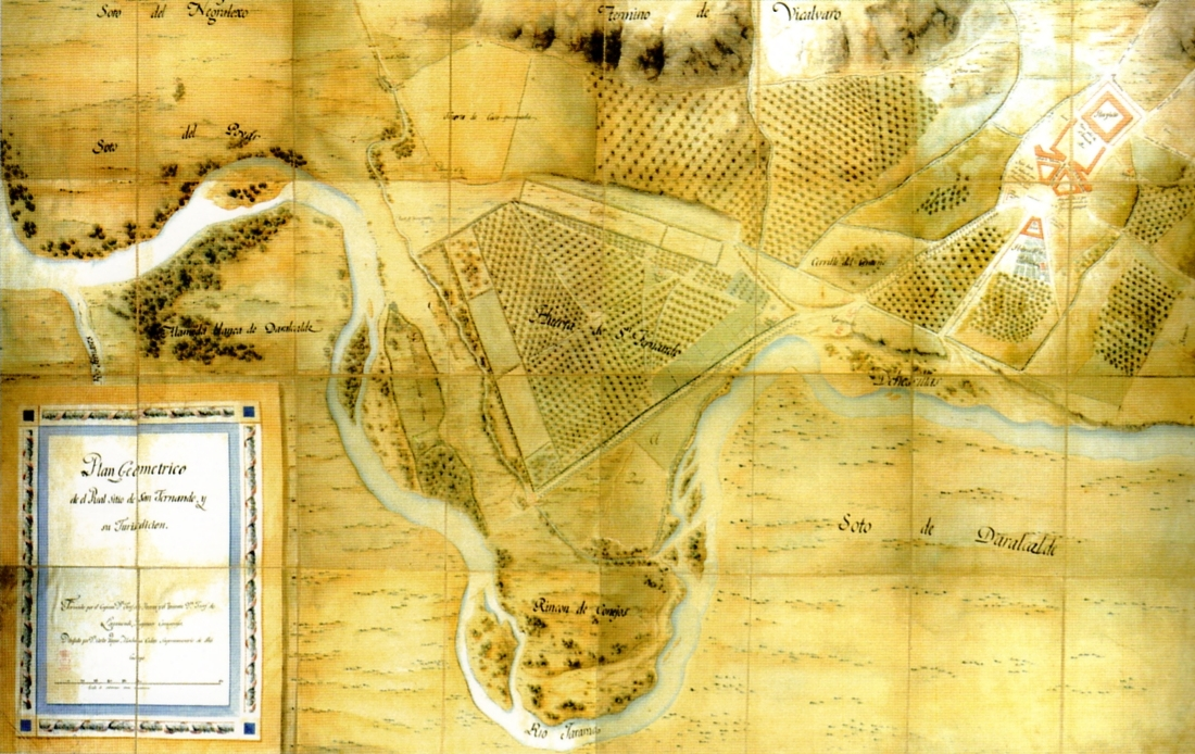 Plano del Real Sitio de San Fernando, realizado por Carlos Vargas Machuca en 1810, que muestra casi en su originalidad, el trazado de la nueva población y la ordenación de su territorio inmediato, según el ideal ilustrado que inspiró la ciudad como manufactura textil bajo patrocinio de La Corona.